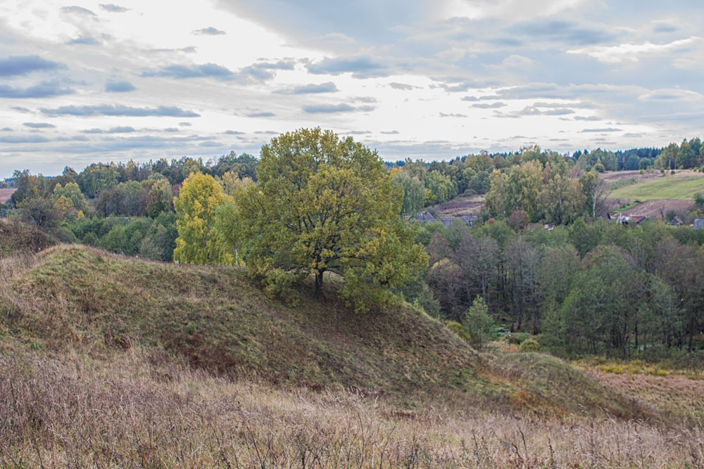 Радамля (Чавускі раён). Гарадзішча. Другая пляцоўка